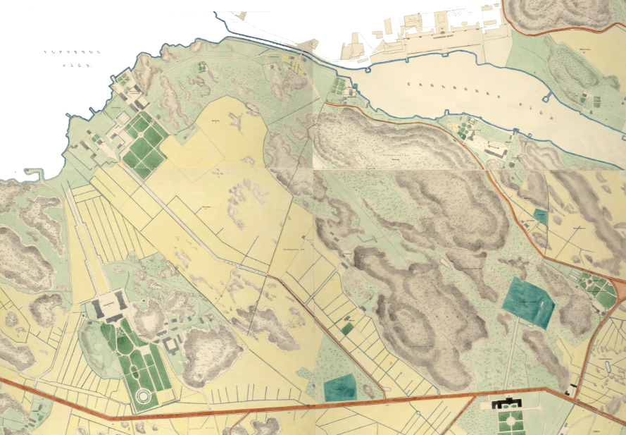 Stadshagen på 1863 års karta över Stockholm